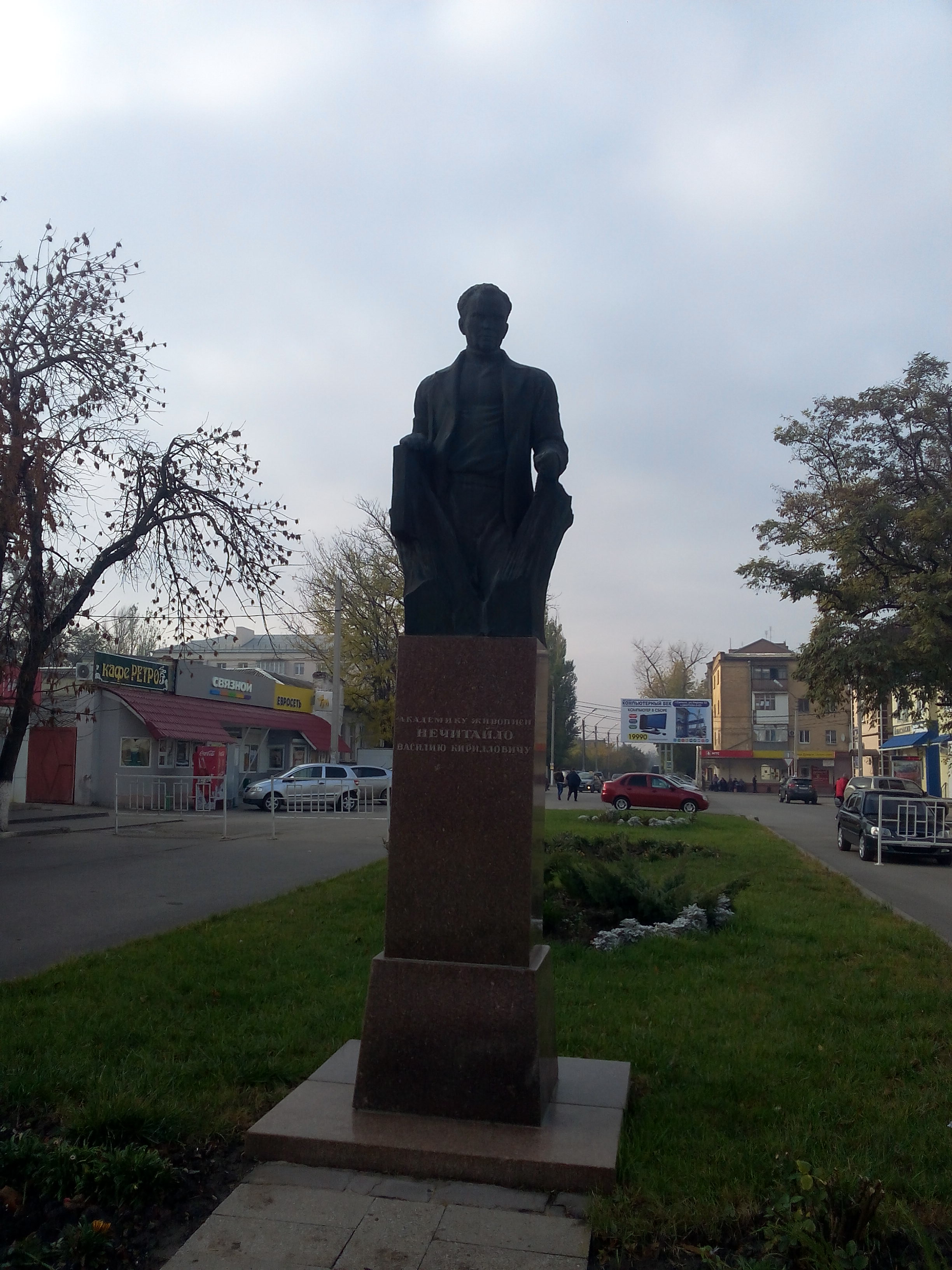 г. Сальск, памятник В.К. Нечитайло (ул. Ленина)